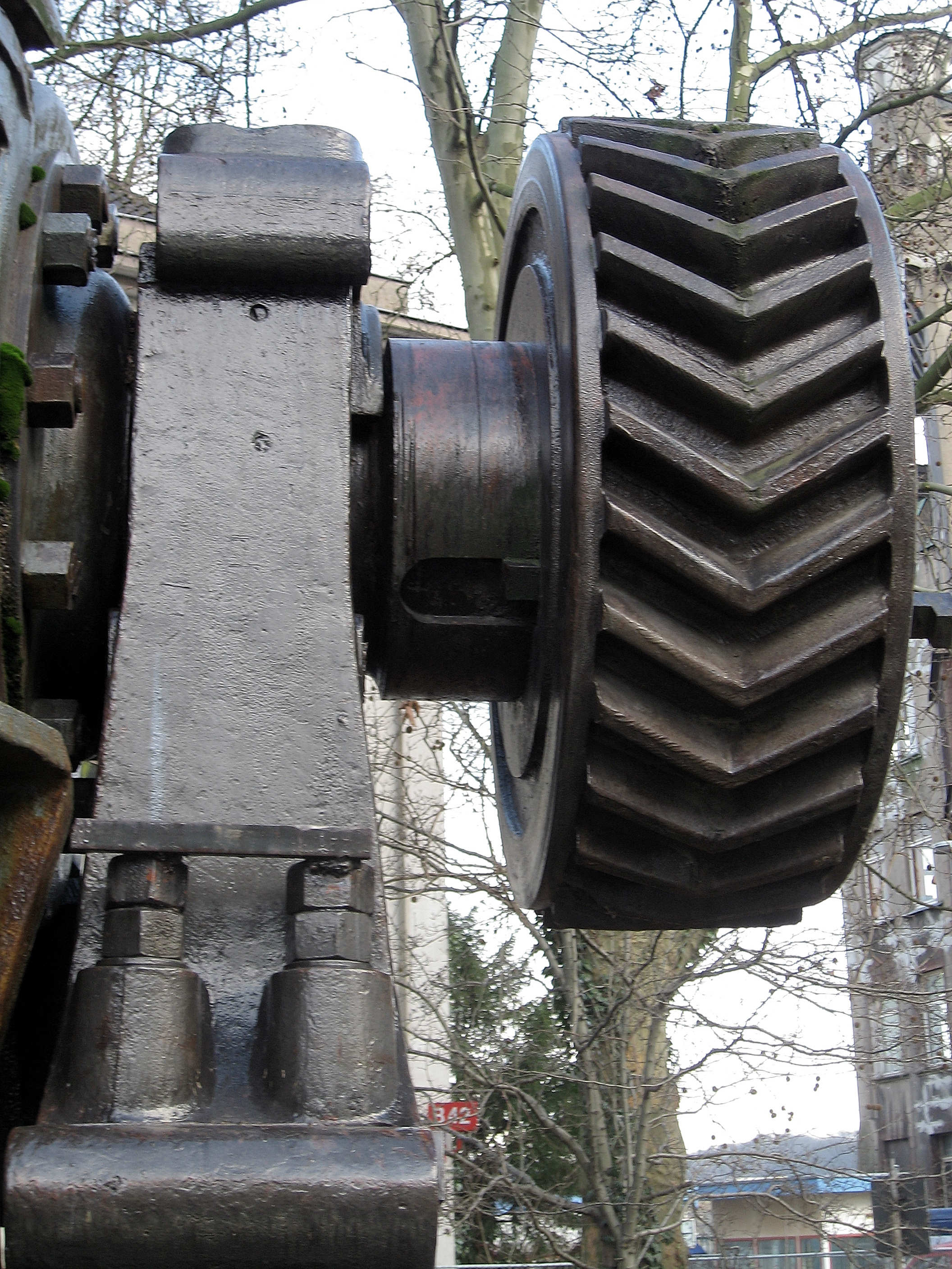 Dortmund-Hörde, Thomas-Konverter vor der Hörder Burg letzte Thomasbirne, die 1954 in der Hörder Kesselschmiede gebaut wurde, bis zur Schließung des Thomasstahlwerks 1964 im Einsatz; Gewicht: 68 Tonnen, Höhe ca. 7 Meter, seit 2002 Industriedenkmal